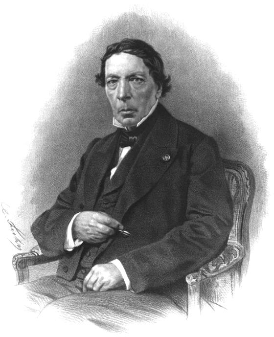 Claude-Louis Mathieu